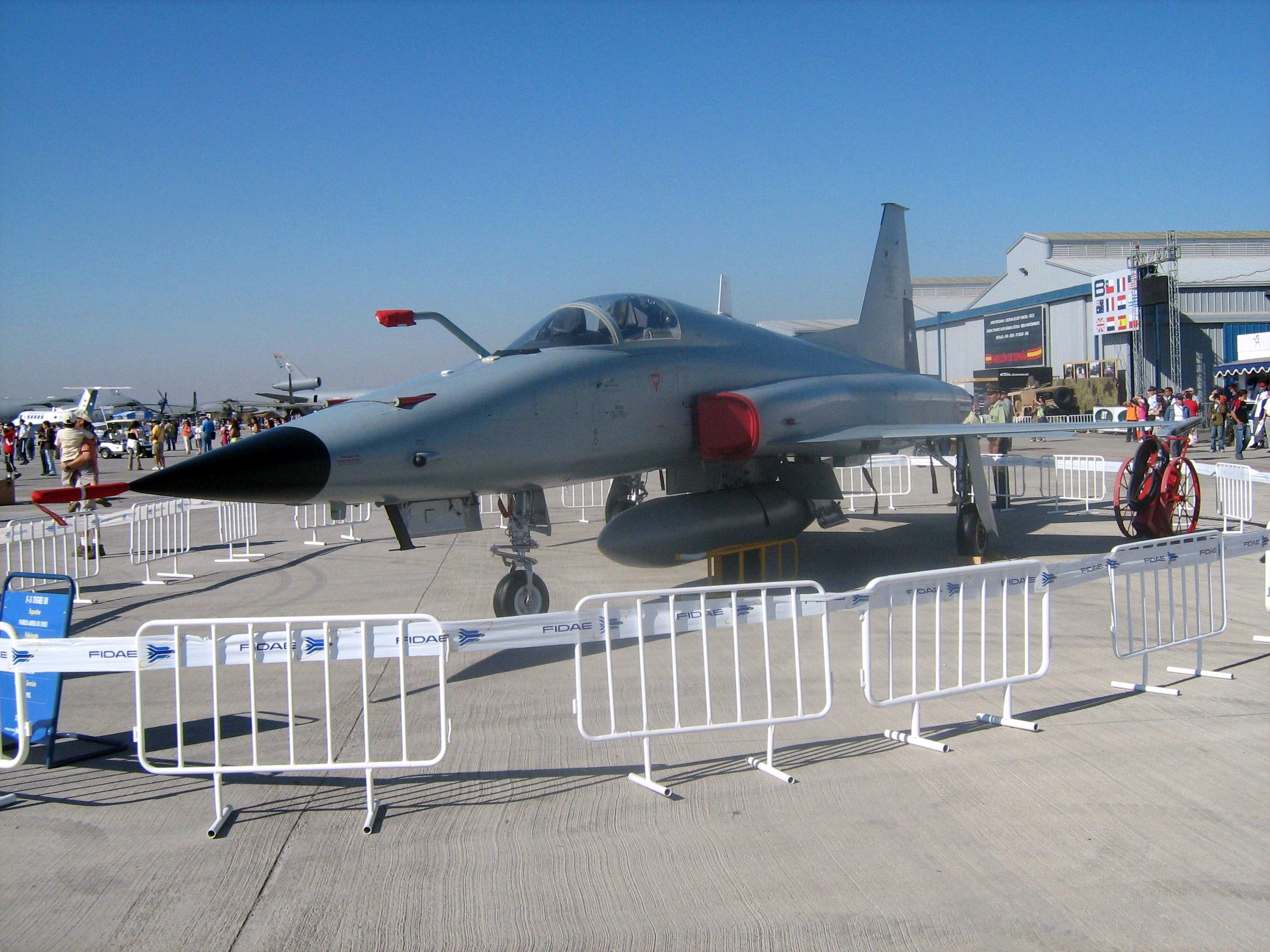 Fotografía de un ejemplar de F-5 "Tigre III PLus" de la Fuerza aérea de Chile en FIDAE 2008